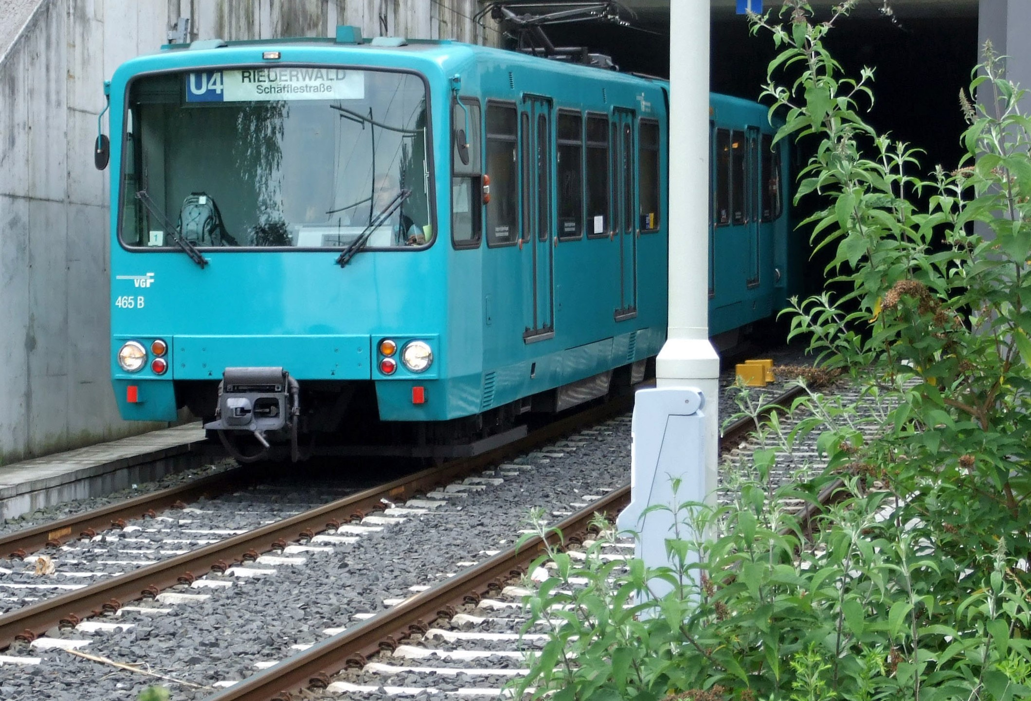 U4 aus Tunnel in Richtung Riederwald, zwischen Seckbacher Landstrasse (U4) und Schäfflestrasse (U7), vor dem Betriebshof Ost (Ffm-Seckbach).